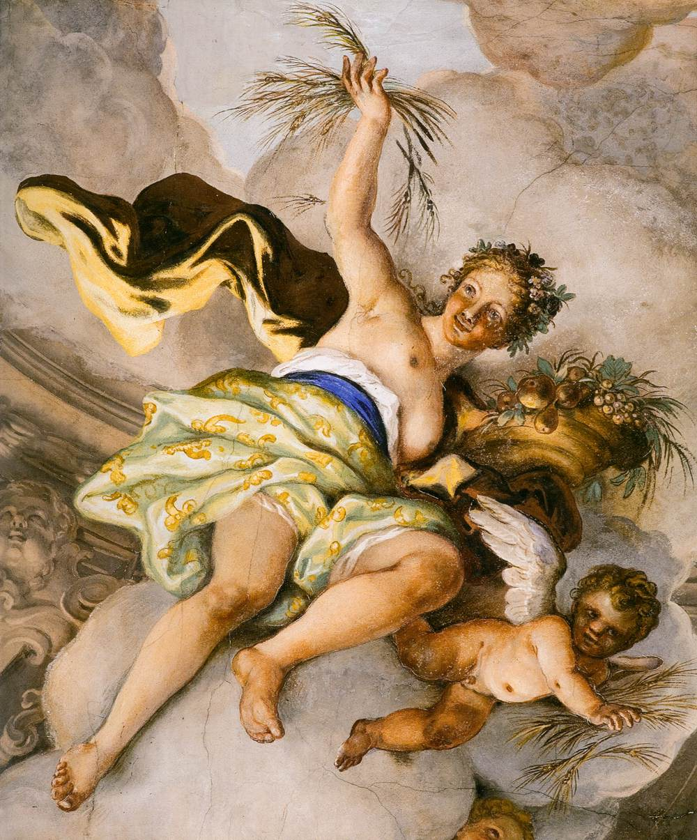 Soffitto del salone di Ca' Dolfin, Venezia. Dettaglio dell'allegoria dell'Abbondanza